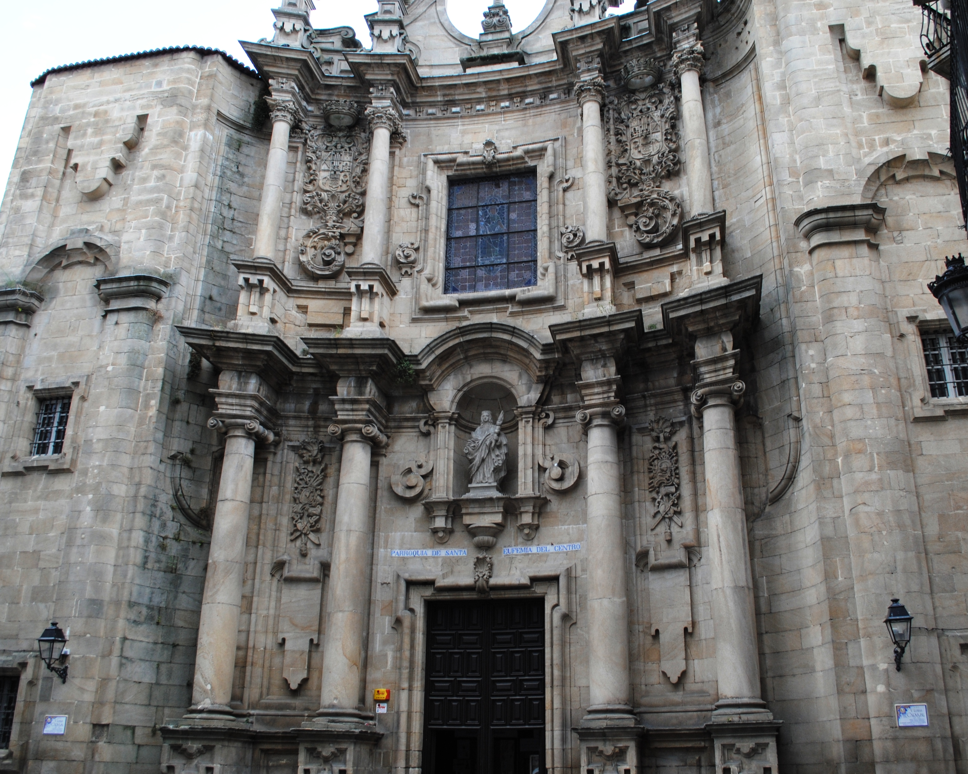 see title